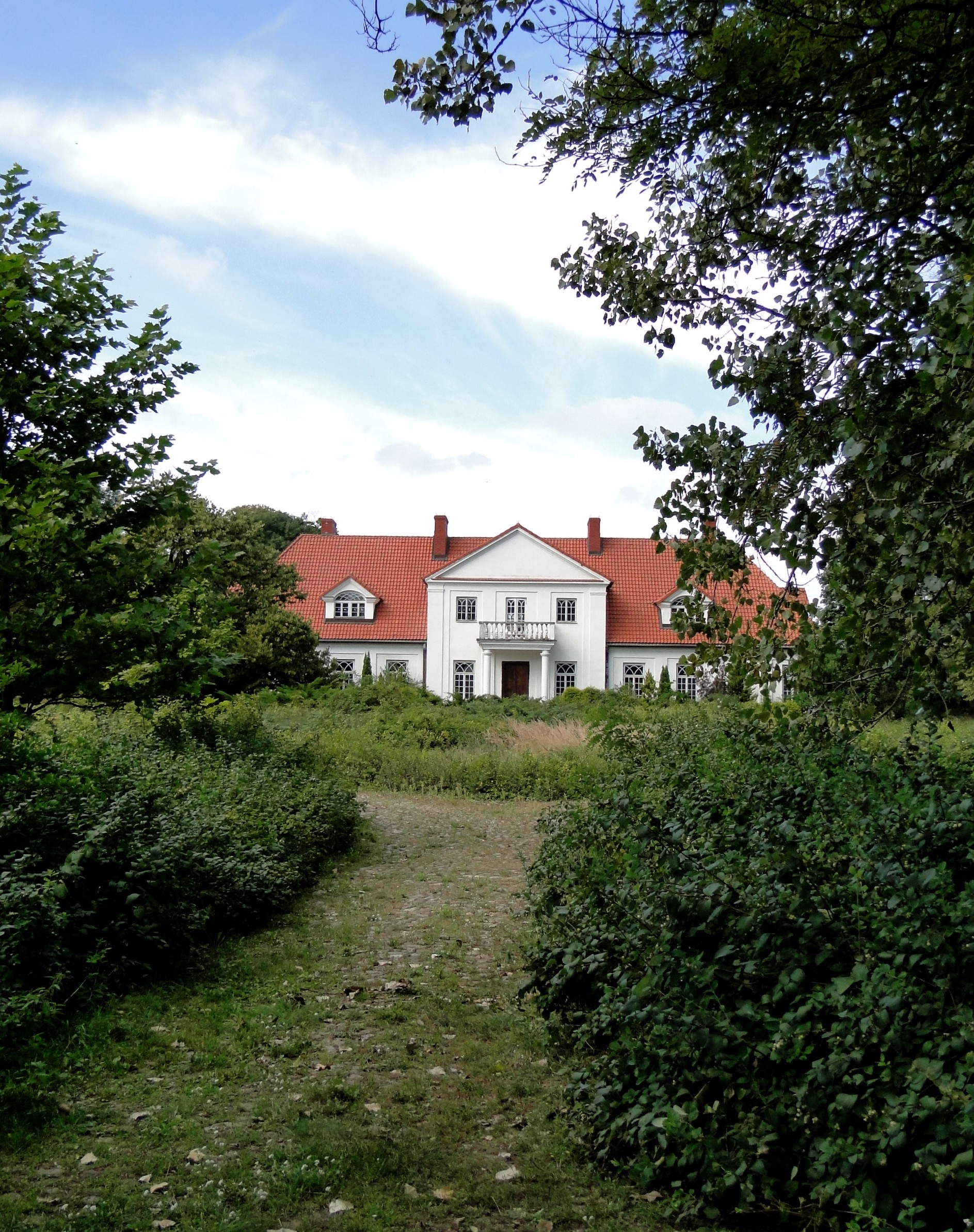 Pałac w Strabli - niestety w rękach prywatnych, niedostępny dla zwiedzających.